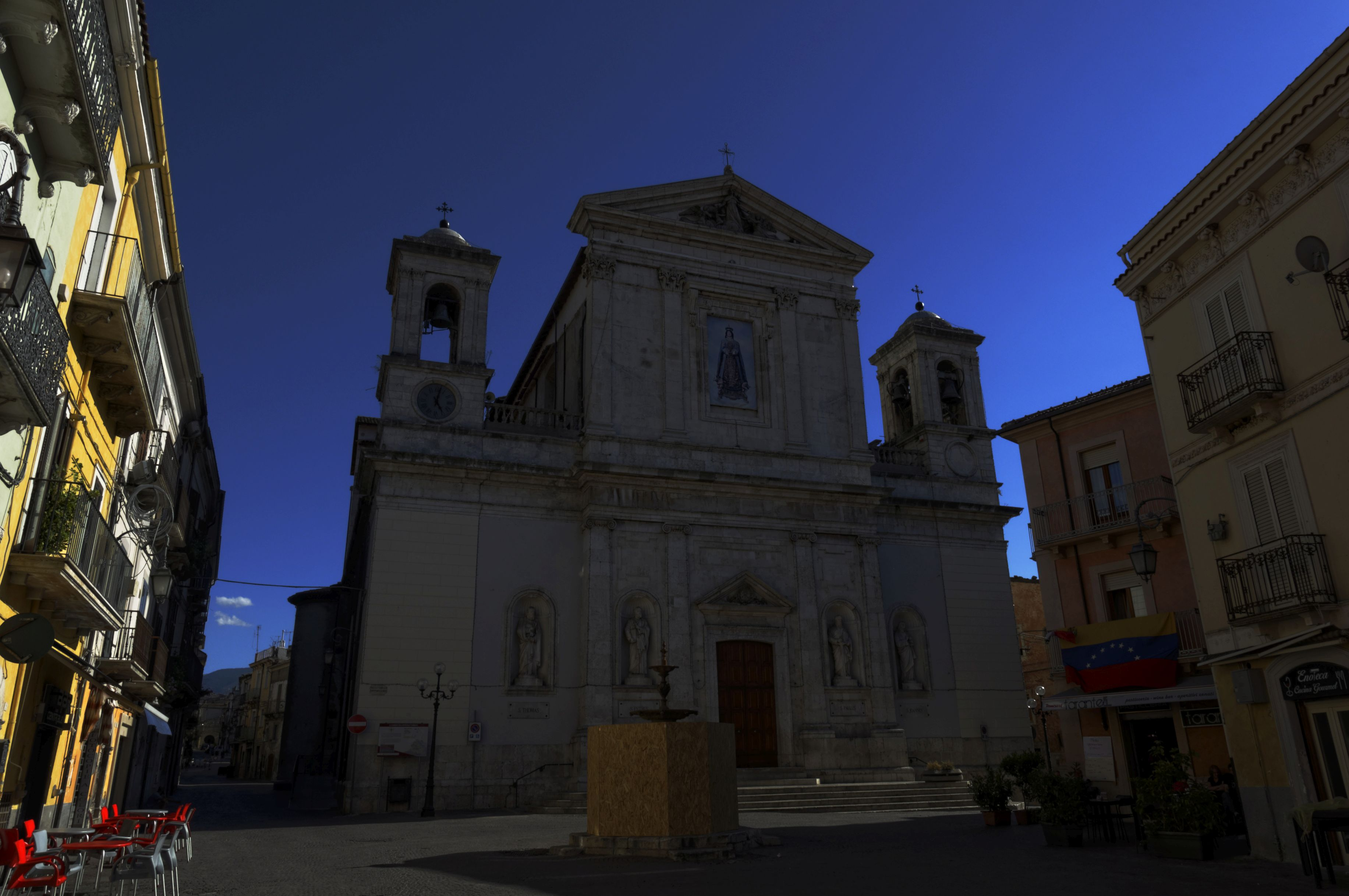 Pratola Peligna - 2017